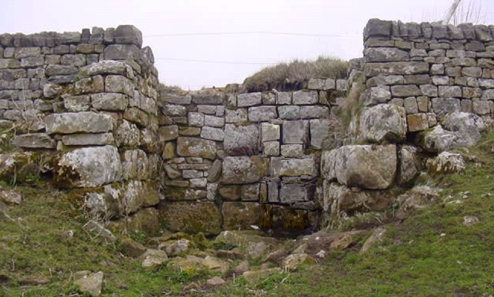 Mauerreste des SW-Zwischenturms vom römischen Kastell Bremenium/Rochester (GB)